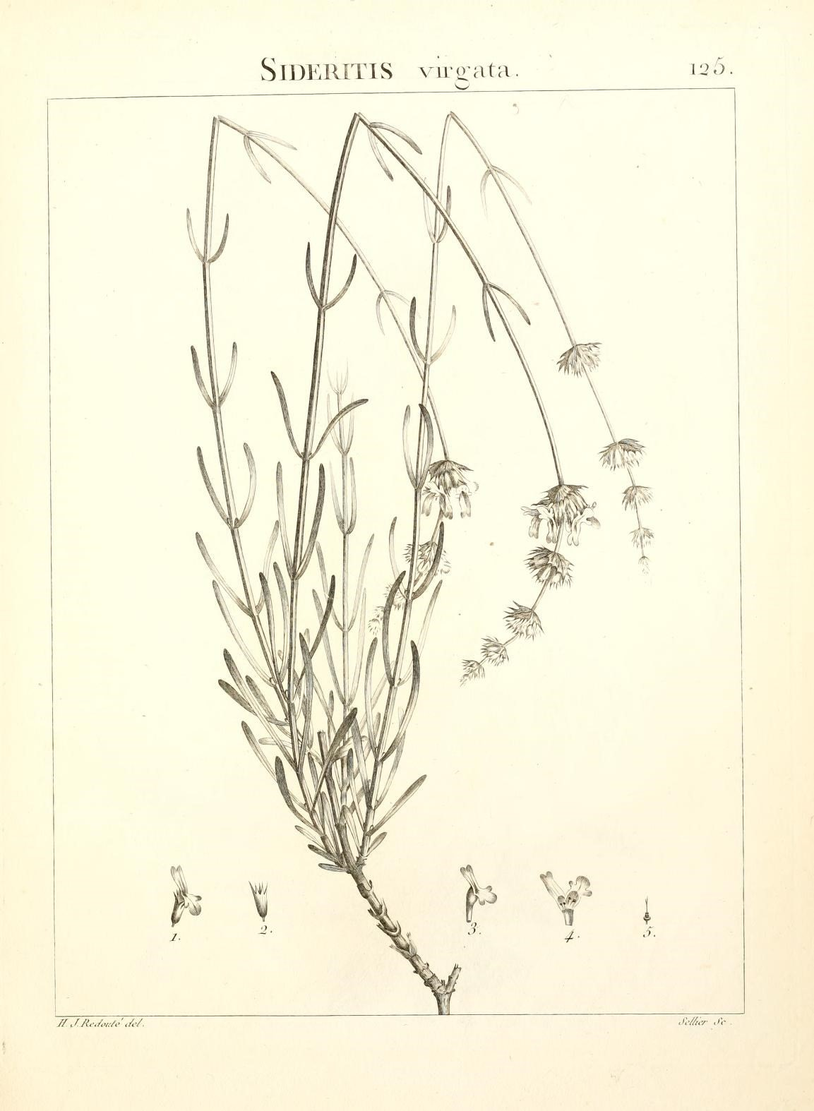 SlDKRITIS vu-oata 12 5 //,*,&■/,.',/(./. ,i;-,#,7- ./r .